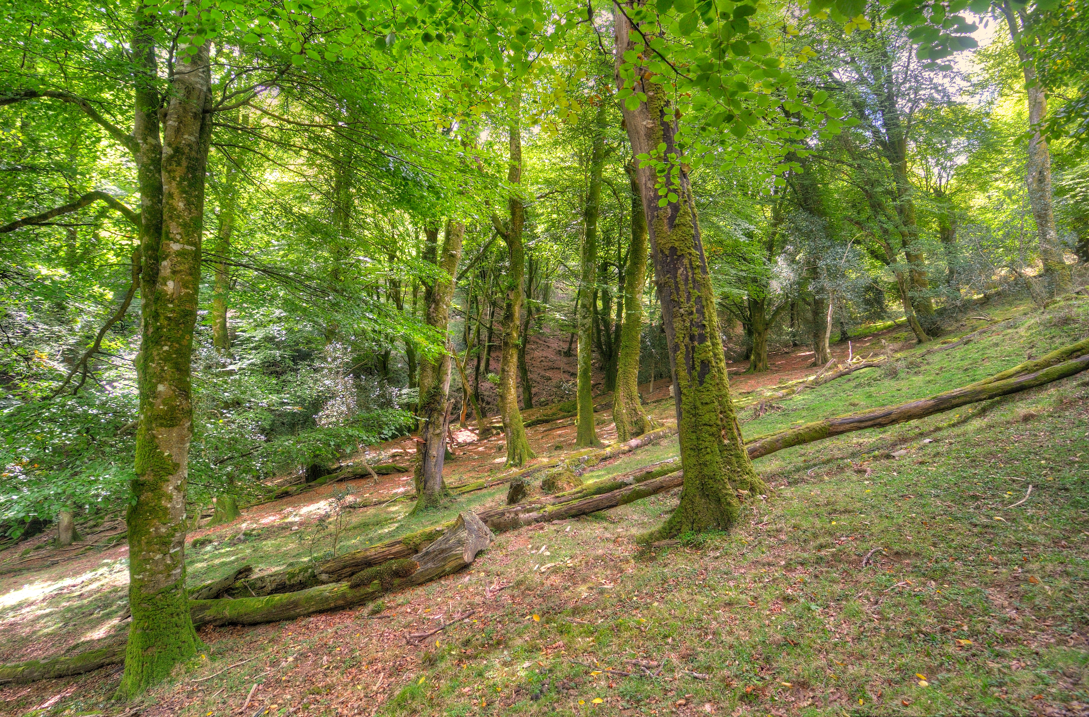 Hayedo de la Biescona, Asturias